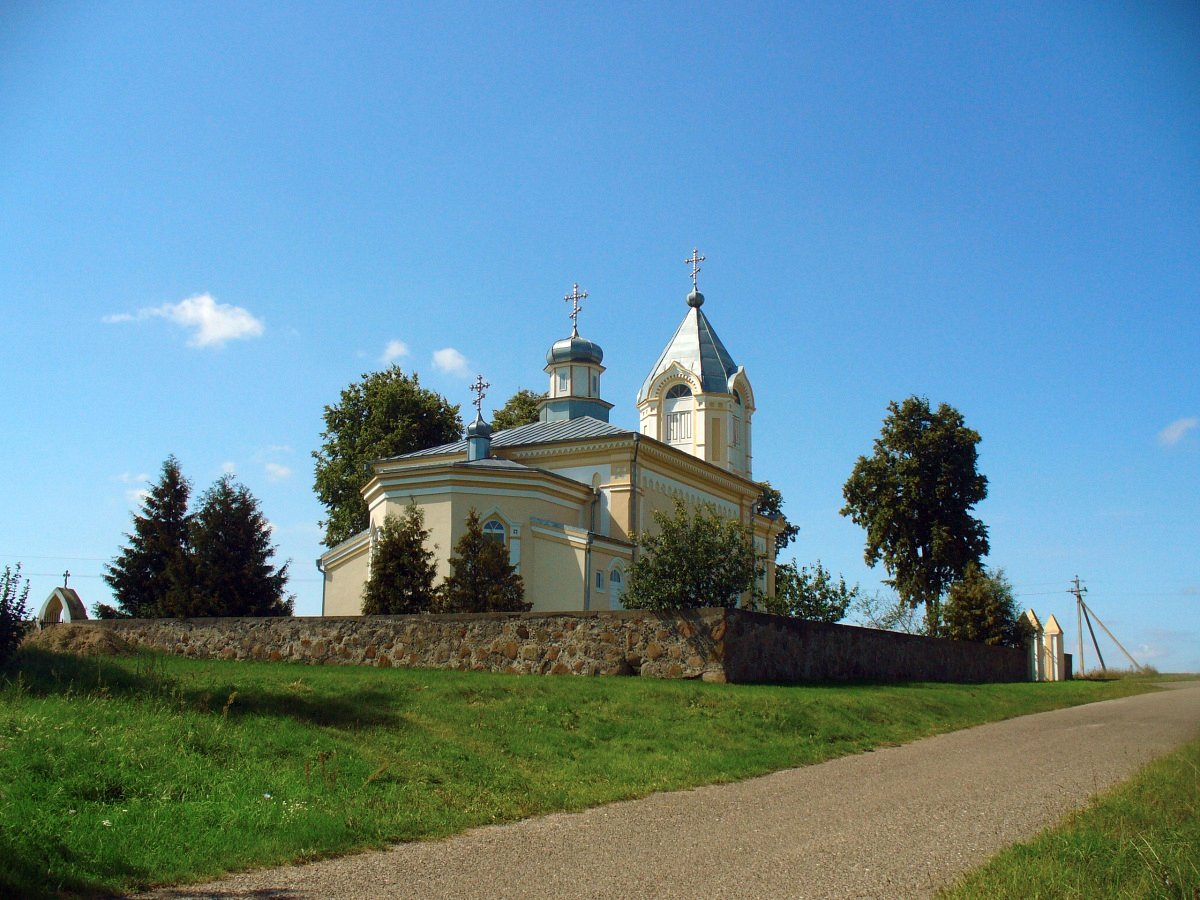 Лічыцы. Свята-Крыжаўзвіжанская царква